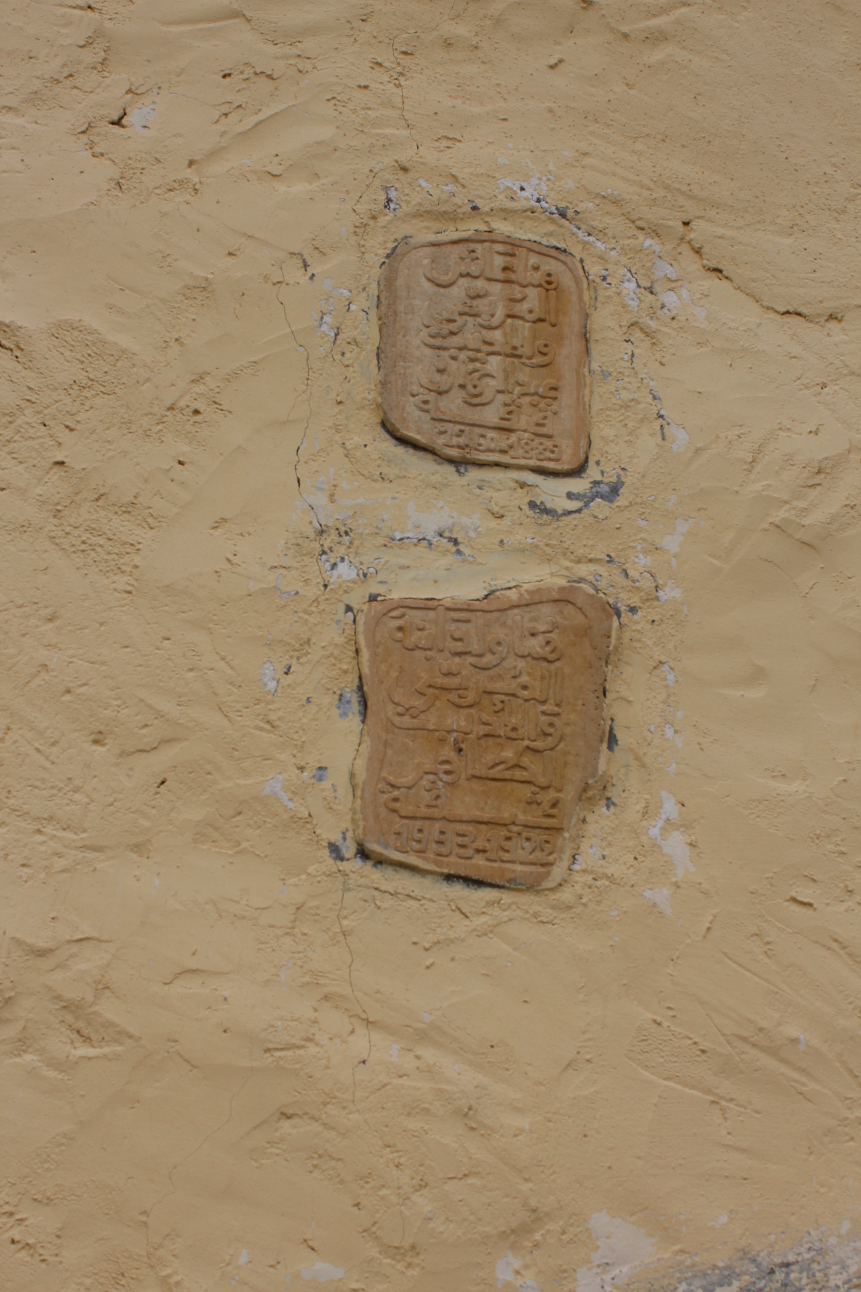 Marbre sculptée sur la façade de la maison de Tahar Guiga.